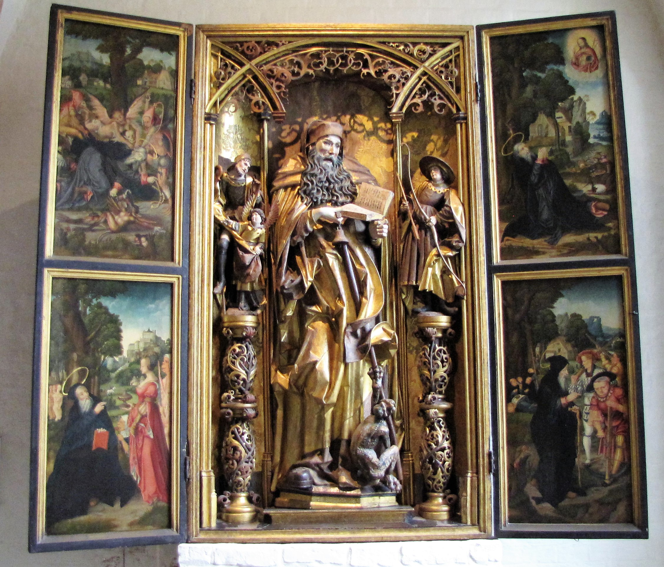 Flügelretabel der Antoniusbruderschaft ("Antoniusaltar"), 1520/22, Skulpturen und Fassung: benedikt Dreyer; Gemälde: Hans von Köln; ehemals in der Burgkirche, heute im St.-Annen-Museum; Corpus der mittelalterlichen Holzskulptur und Tafelmalerei in Schleswig-Holstein Band I, Nr. 164